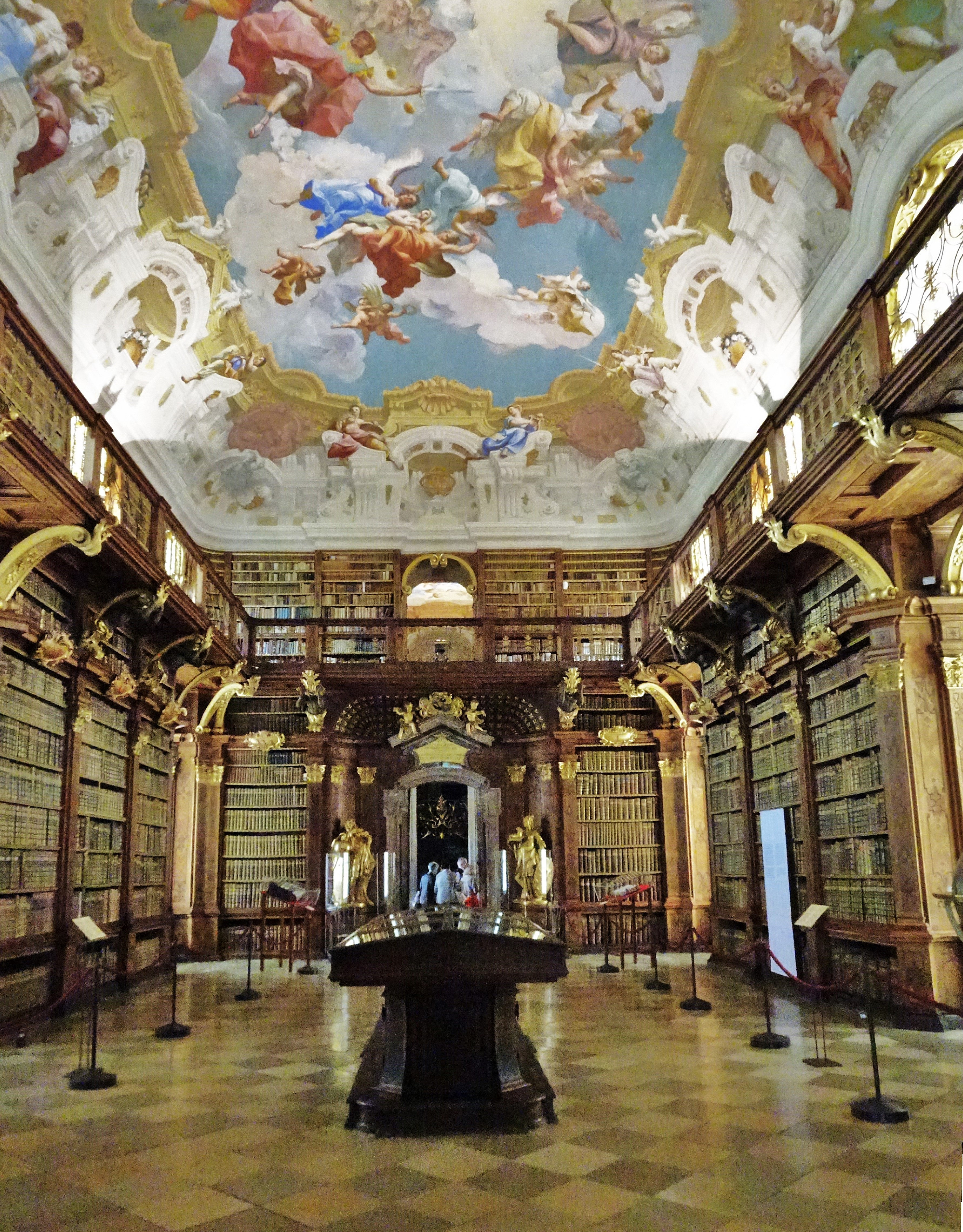 Stift Melk, Bibliothek